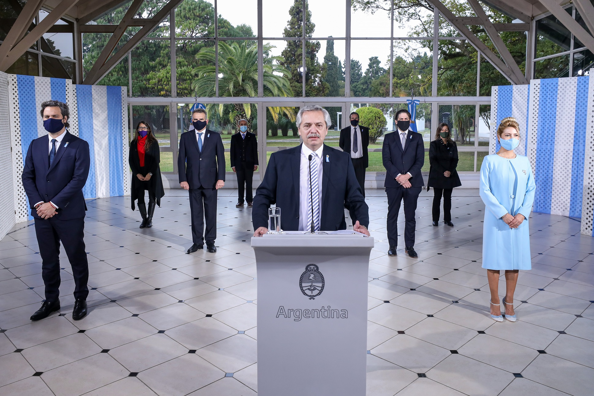 El presidente de Argentina saludó por videoconferencia a alumnos de cuarto grado de todo el país, a quienes tomó la promesa a la Bandera